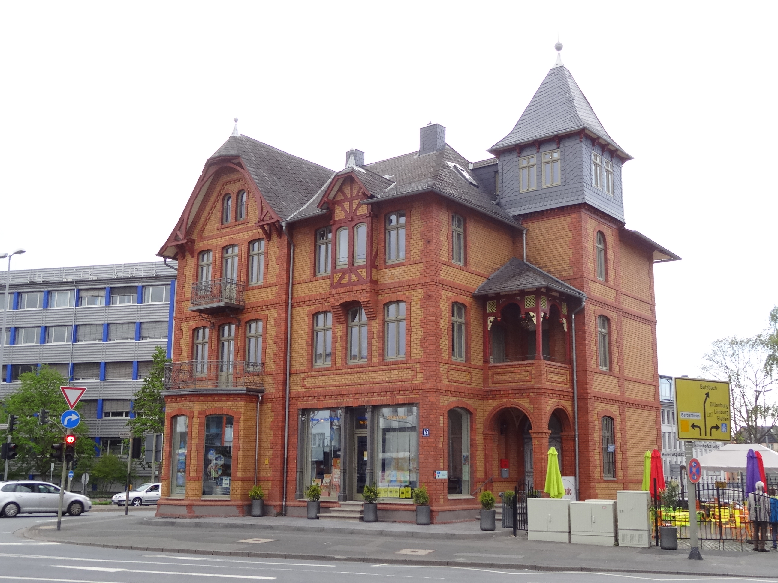 Buderusplatz 5 (Wetzlar)